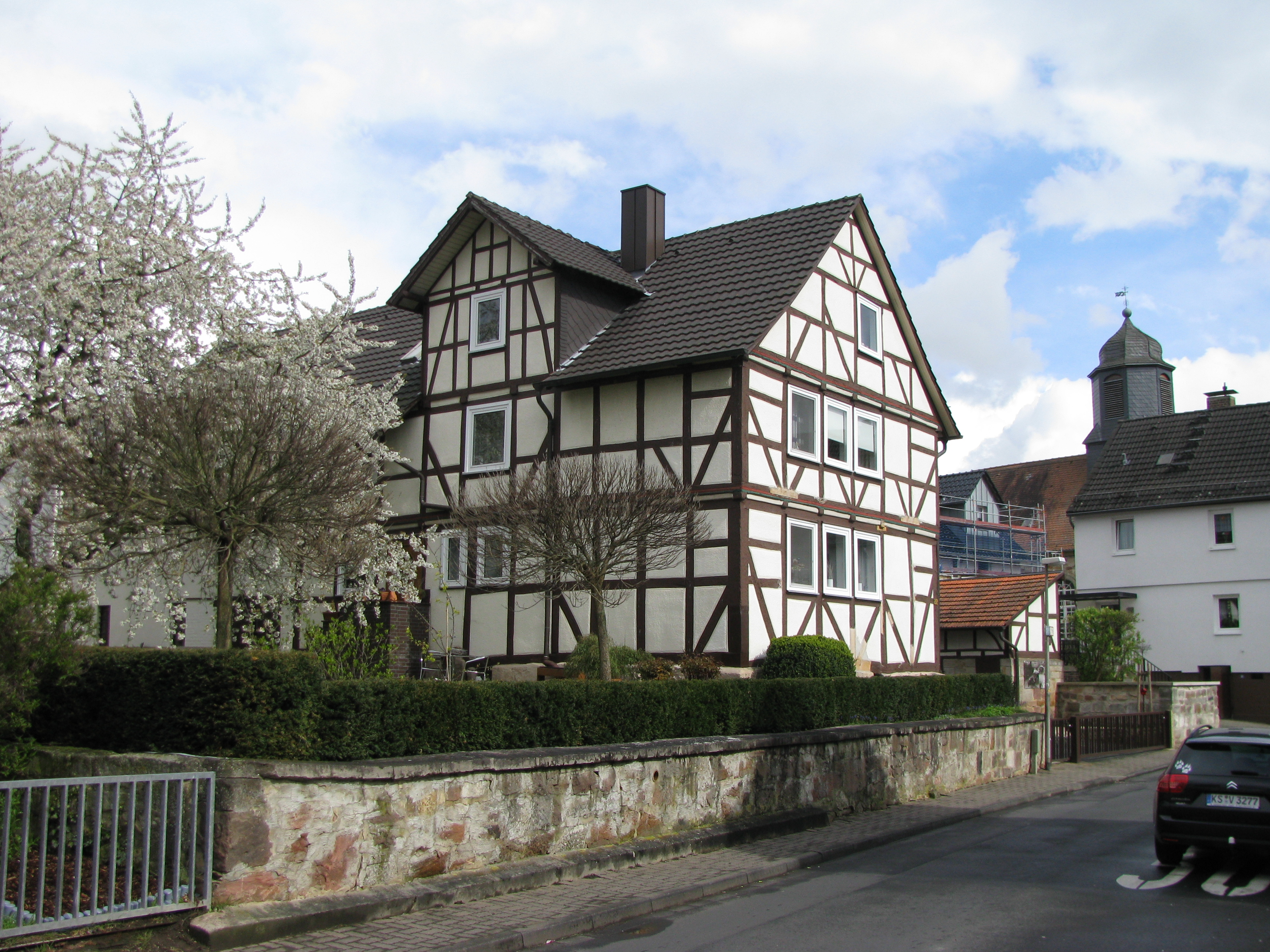 das Haus Kasseler Straße 22 in Fuldabrück-Bergshausen von Nordwesten